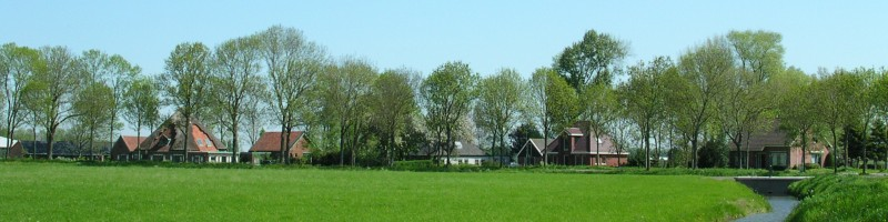 Het gehucht Blokdijk. The village of Blokdijk.